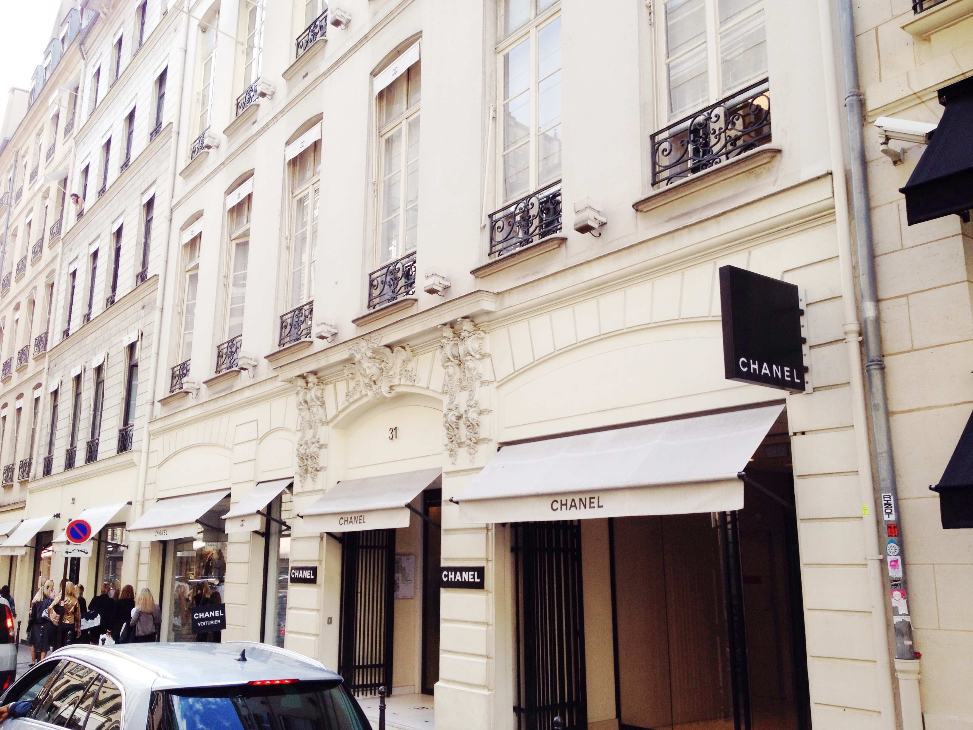 Ancien appartement de Coco Chanel